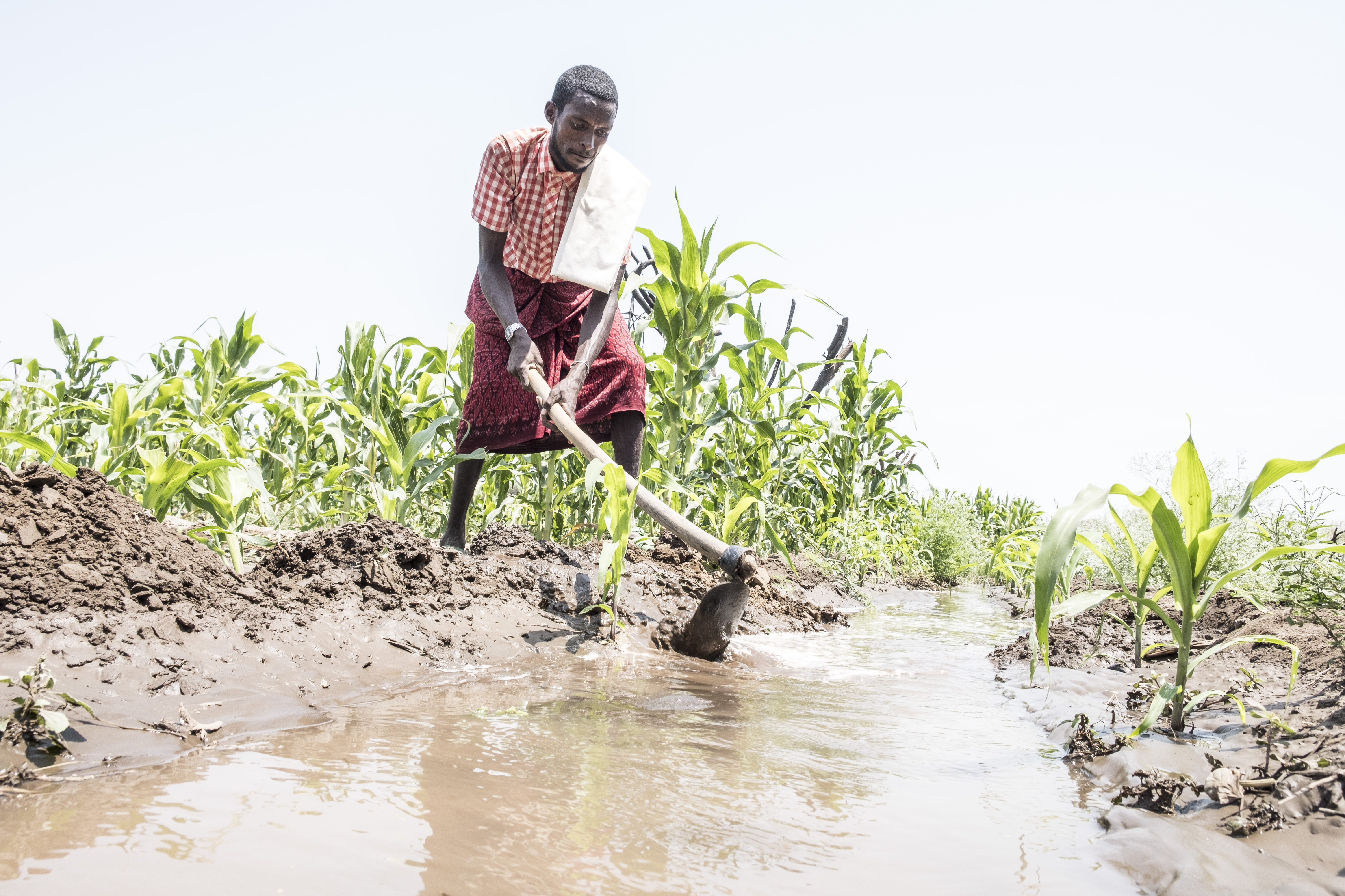 Bewässerungslandwirtschaft in der Savanne von Subuli, Region Afar